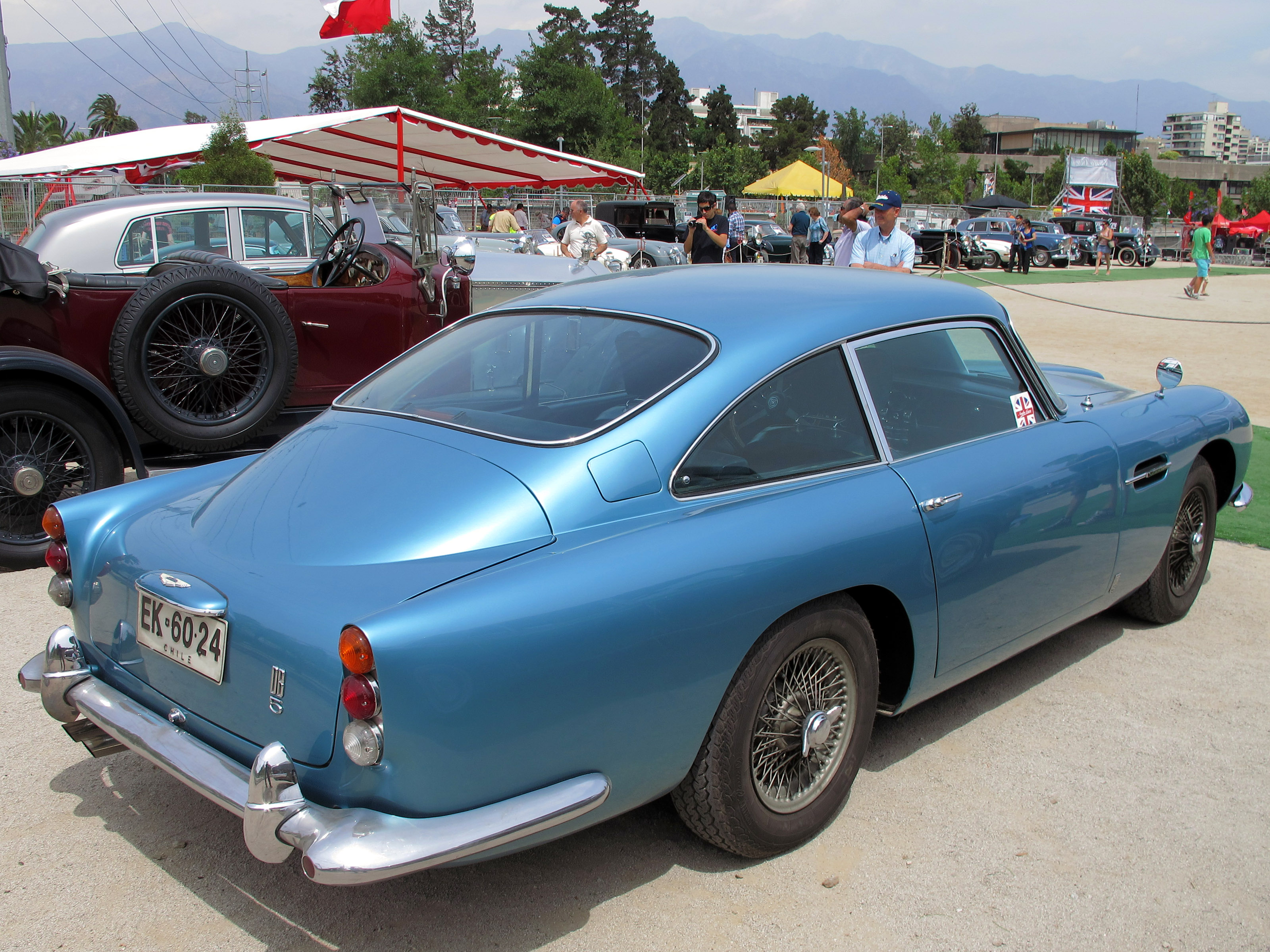 Aston Martin DB5 Vantage Superleggera 1964